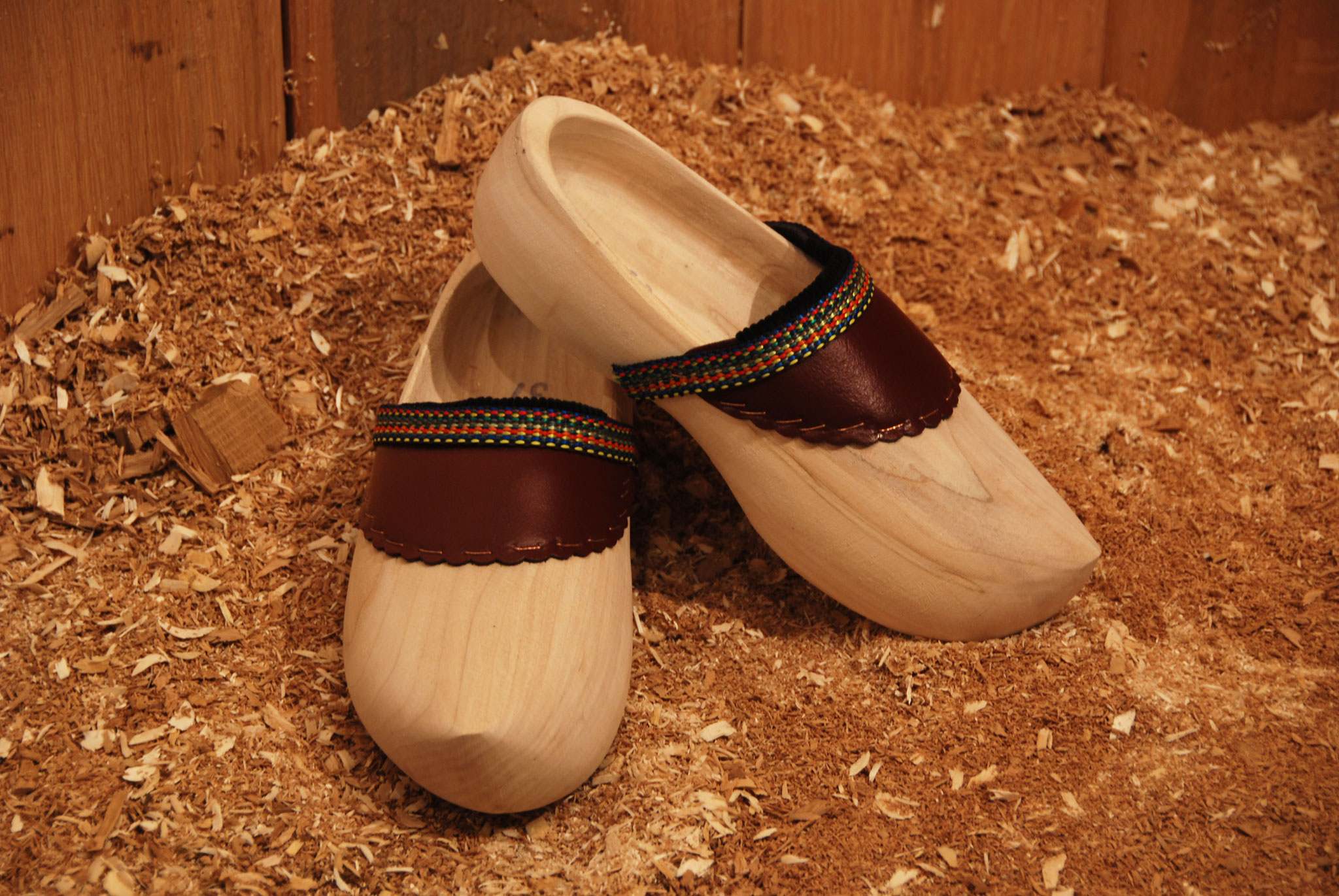 Münsterländer Holzklumpen haben eine lange Tradition. Früher waren sie heiß begehrt bei den Menschen vom Land und aus der Stadt. Denn Holzklumpen waren so ziemlich das einzige Schuhwerk, das bezahlbar gewesen ist. Und das darüber hinaus auch zu Recht als sehr stabil und haltbar bei der Landarbeit galt. Münsterländer Holzklumpen und Westfälische Holschen haben einen Lederbesatz in Form einer durchgehenden Lederkappe über dem Rist.